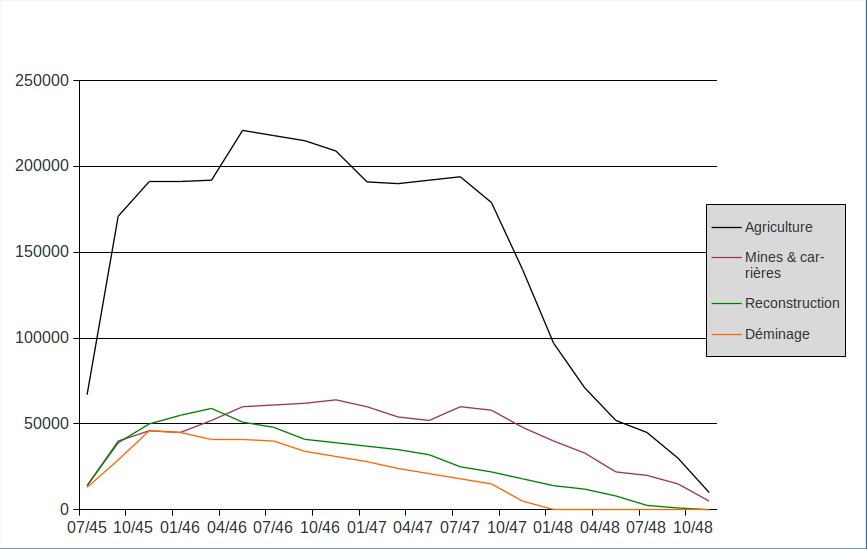 Source : Général Buisson, Historique du service des prisonniers de guerre de l’Axe, 1943-1948, Paris, ministère de la Défense nationale, 1948